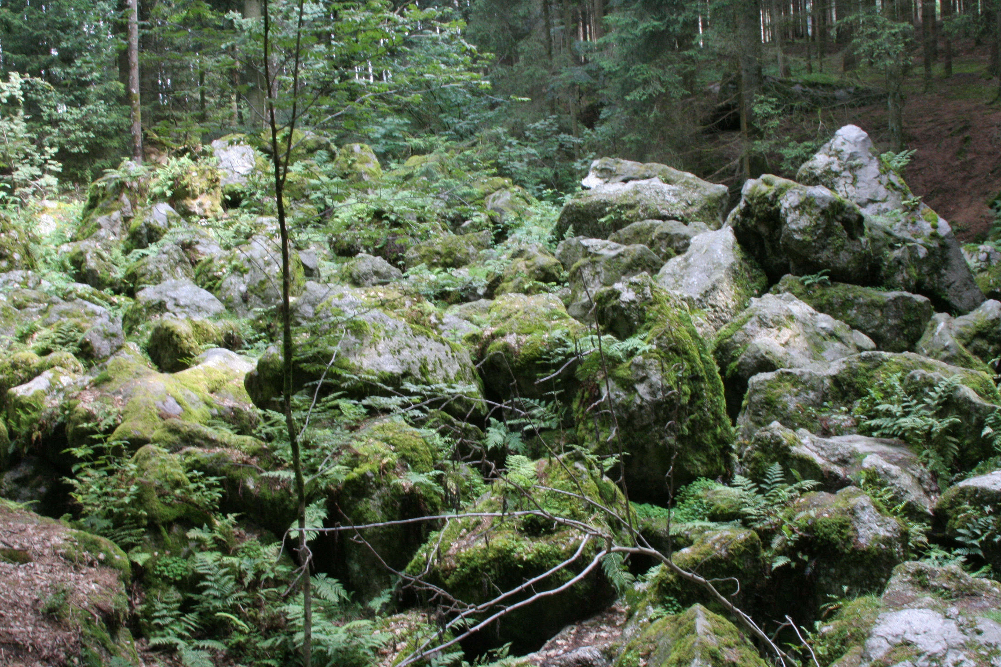 Einige Felsen der „Kaser Steinstube(n)“ in Triftern. Blockstrom aus Quarzkonglomerat, Geotop in Niederbayern, vgl. [1].